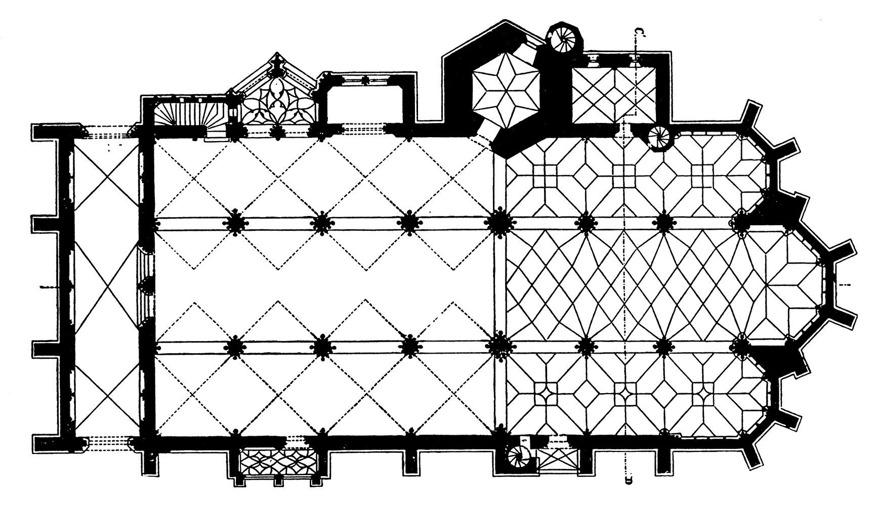 Grundriss der Steyrer Stadtpfarrkirche